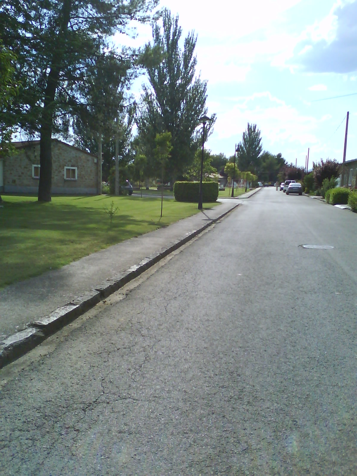 Zangozako Gabarderal kontzejuaren ikuspegia.